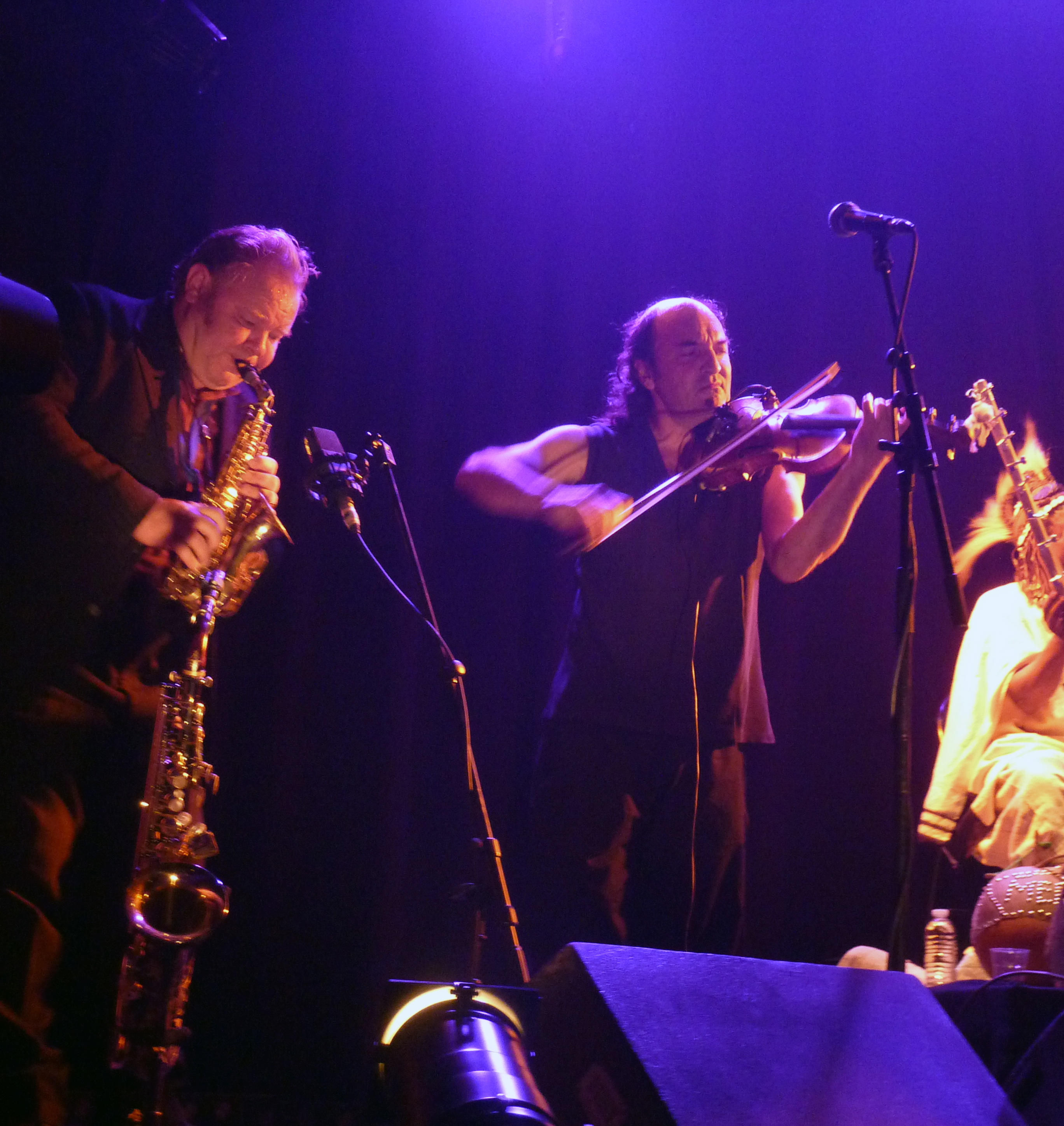 Jacky Molard Quartet & Foune Diarra Trio, festival d'lle de France 2011